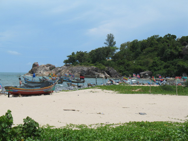 Songkhla Fishermen Village in Tambon Bo yang, Amphoe Mueang Songkhla.